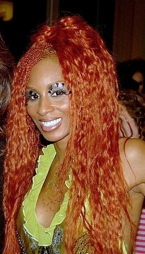 Mia Frye au salon du chocolat.